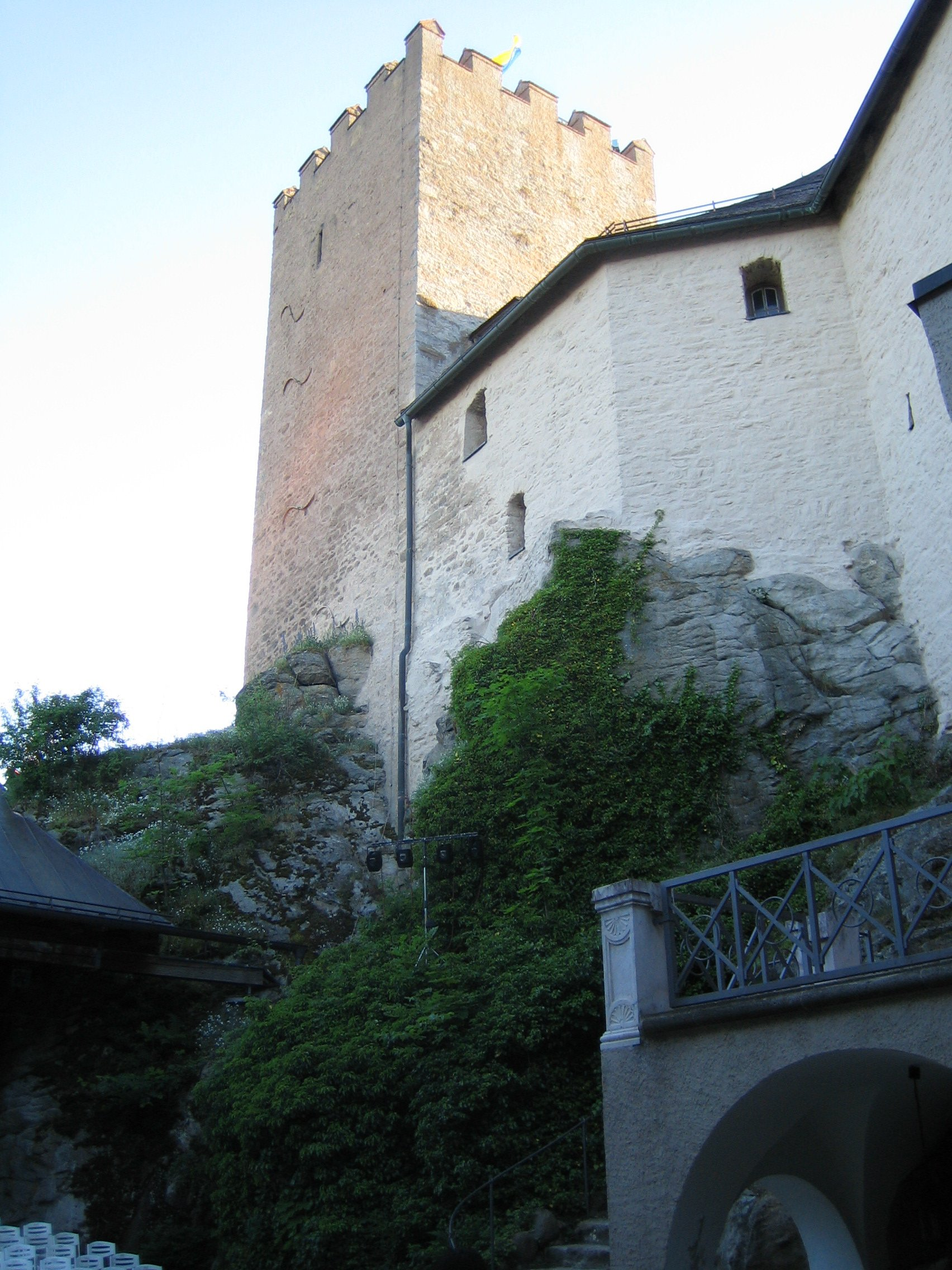 Burg Falkenstein i.d. Oberpfalz